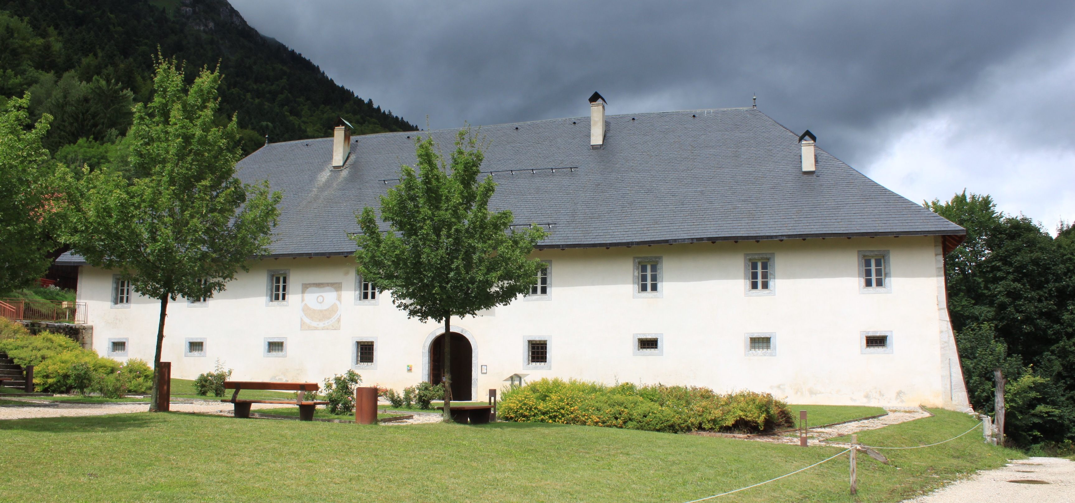 Aillon-le-Jeune, Savoie, France